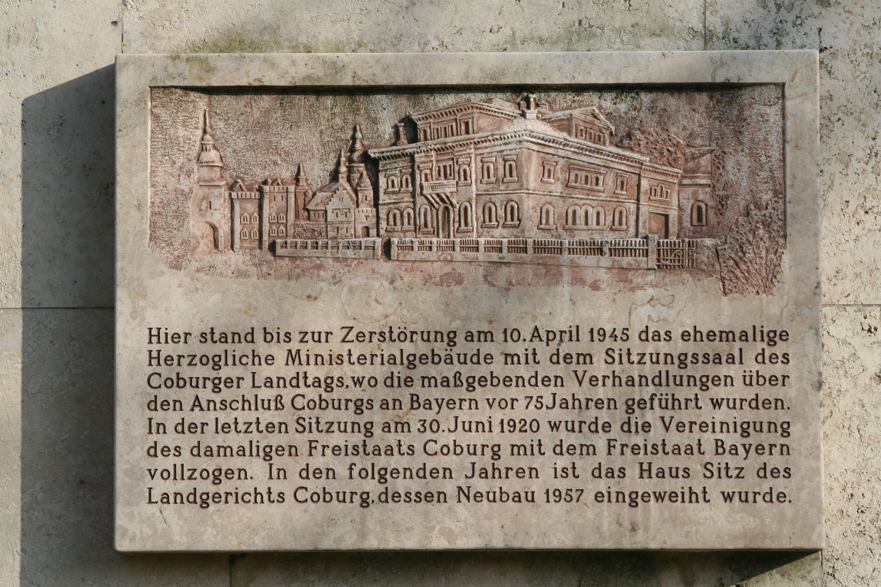 Ketschendorferstraße 1, Tafel am Justizgebäude in Coburg